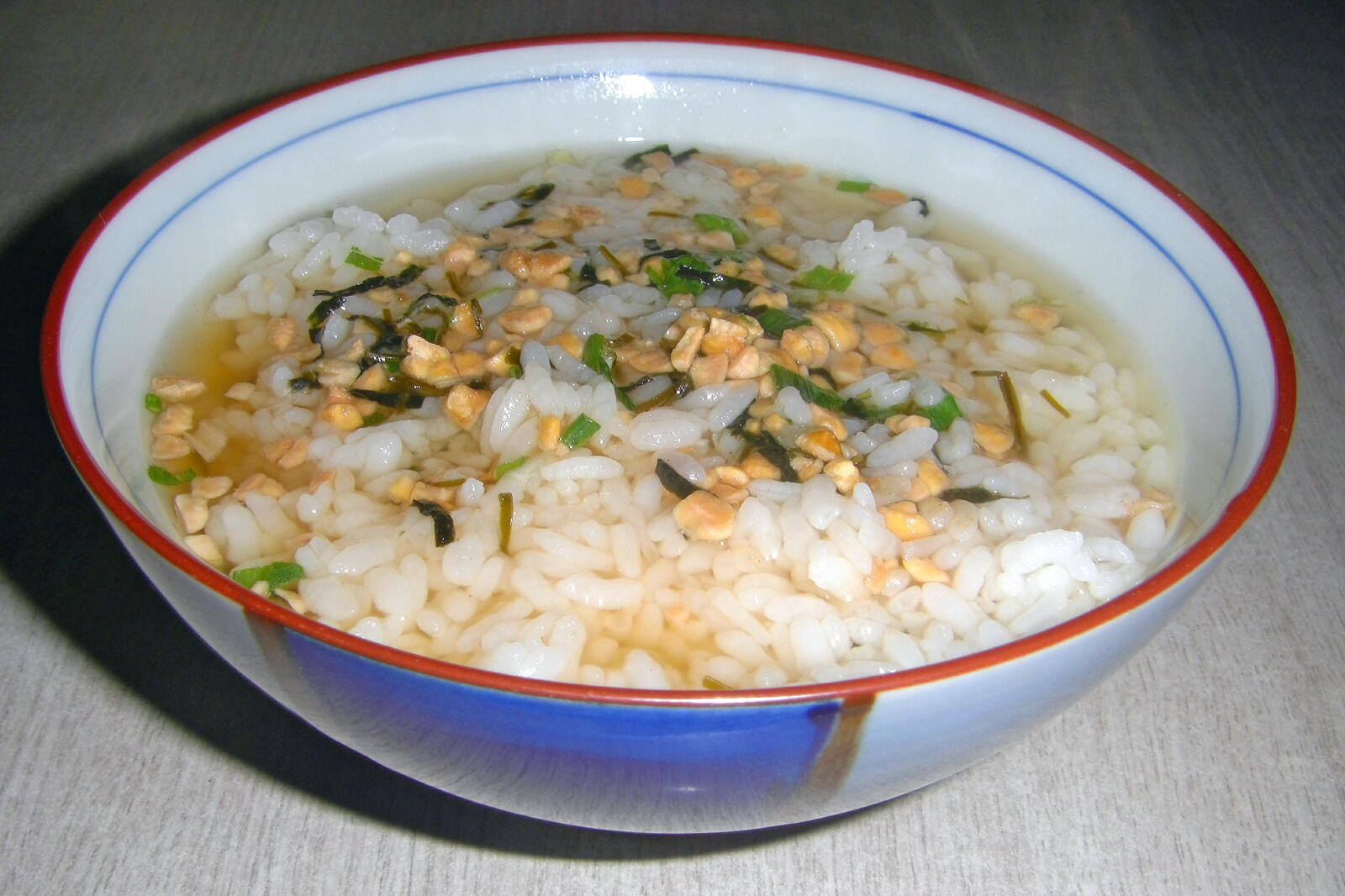 納豆茶漬け